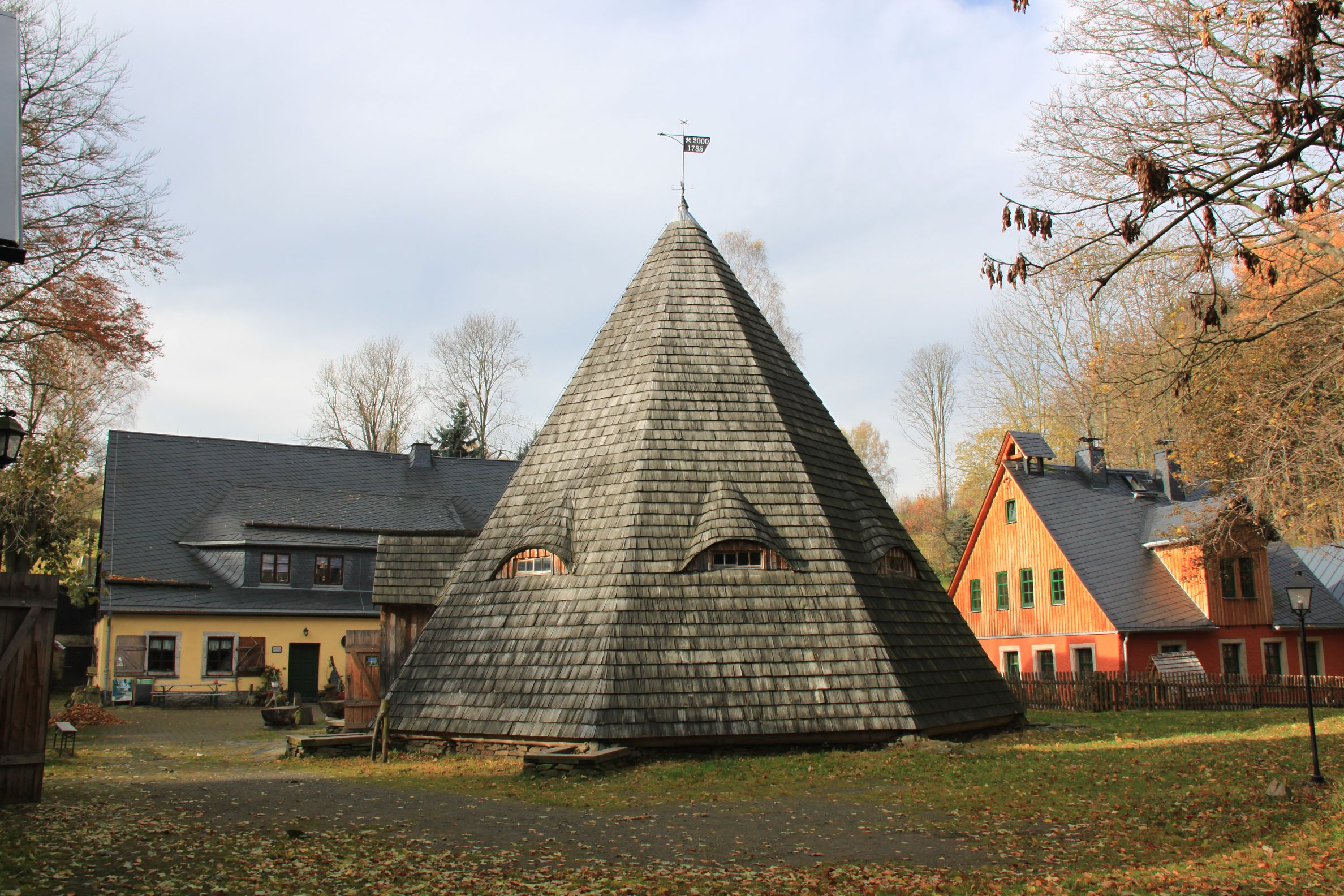 Bergschmiede und ehemaliger Pferdegöpel der Fundgrube Markus Röhling in Frohnau